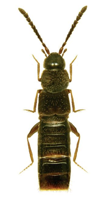 Schistoglossa sphagnorum